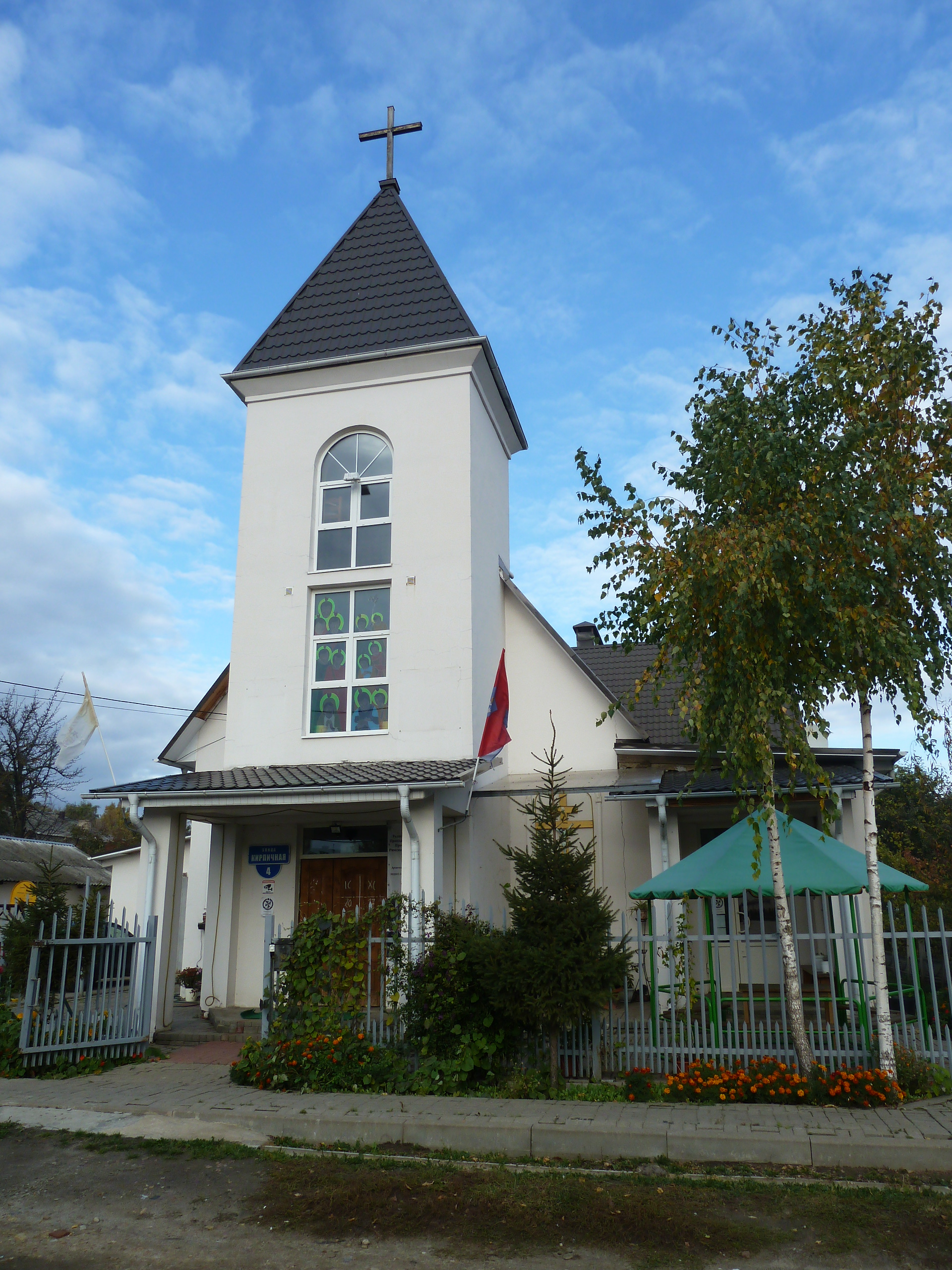 Католический храм во имя Непорочного зачатия Девы Марии